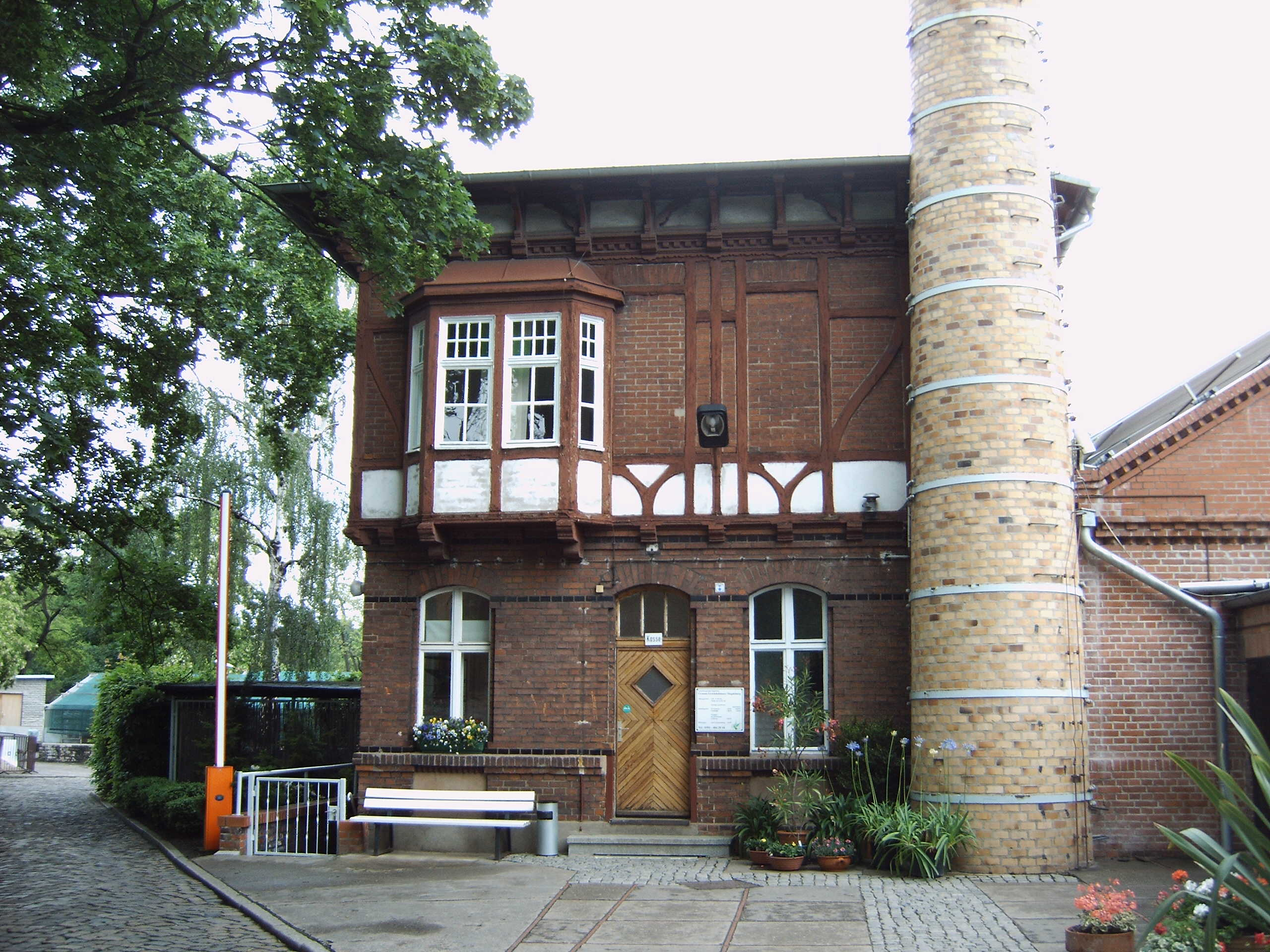 Gruson-Gewächshäuser in Magdeburg, Verwaltungsgebäude Bild aufgenommen am 28.5.2006